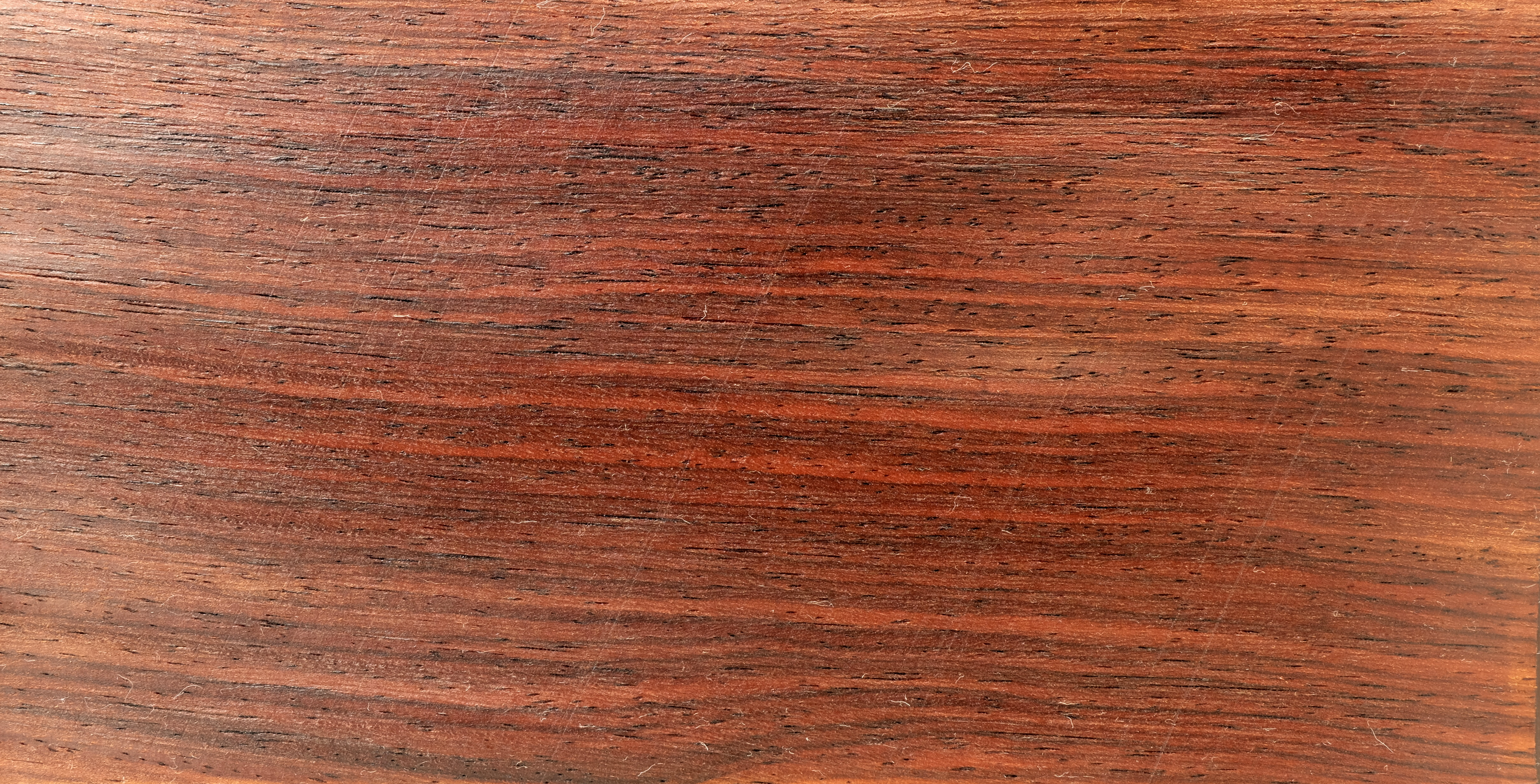 gemessertes Furnier; Holzart: COC, Cocobolo, Grenadillo, Nambar, Palo sando